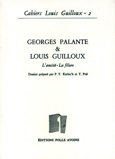 Couv. correspondance GP-LG